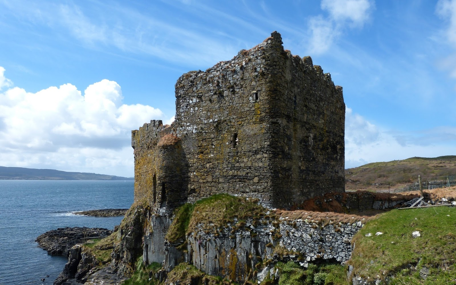 Mingary Castle, Ansicht von Nordosten